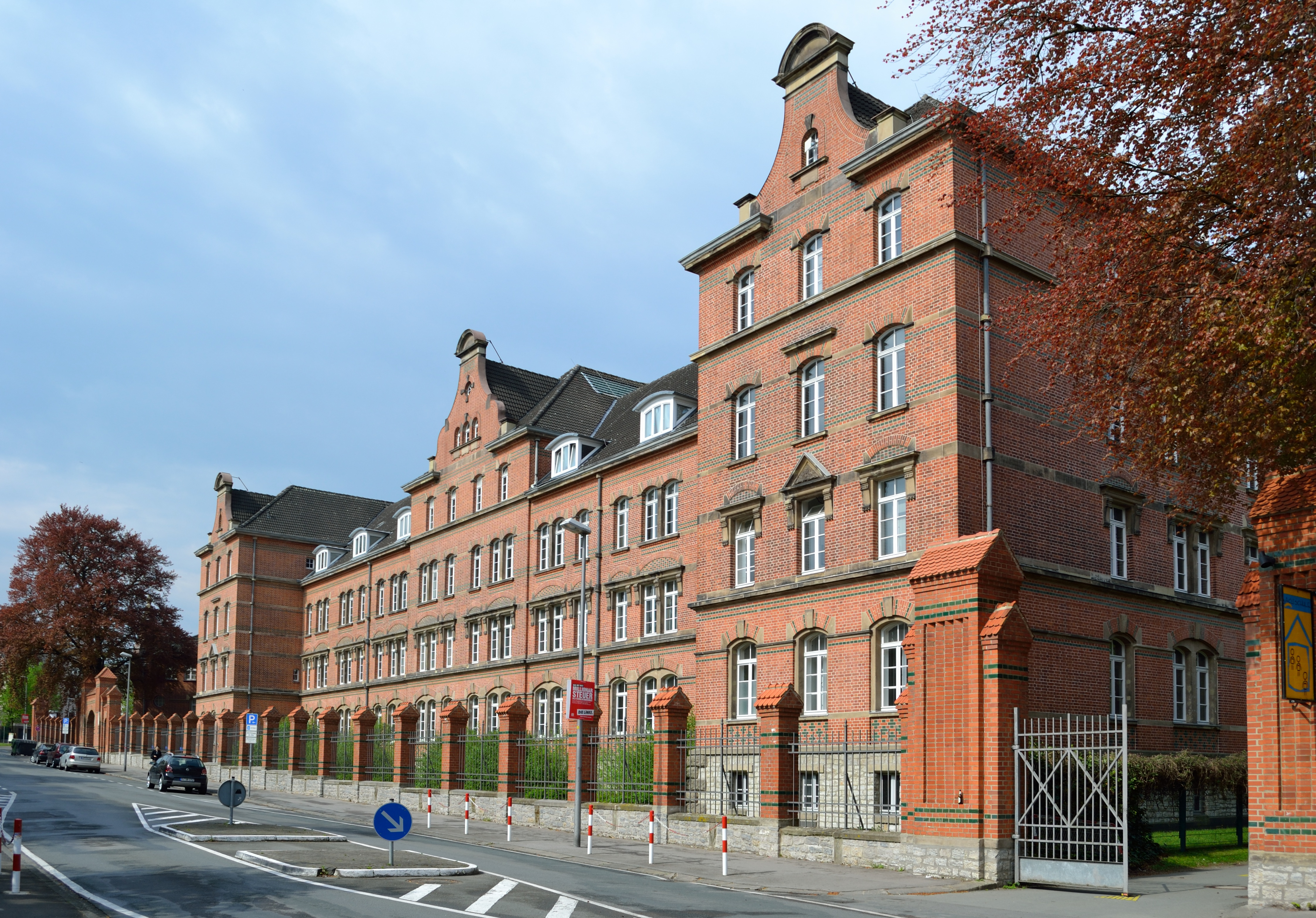 Ehemalige 55er Kaserne This is a photograph of an architectural monument.